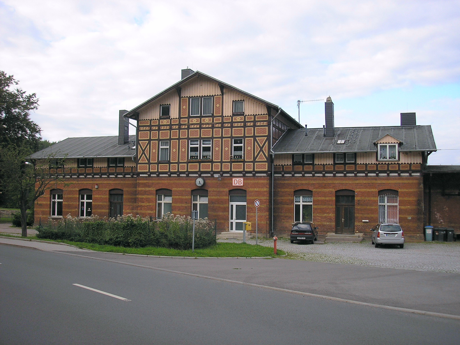 Der Bahnhof von Elgersburg bei Ilmenau in Thüringen